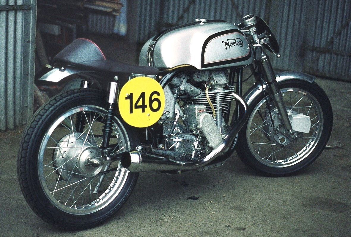 Norton Manx, Baujahr 1954, beim Oldtimer-Grand-Prix des AvD im Fahrerlager des Nürburgrings